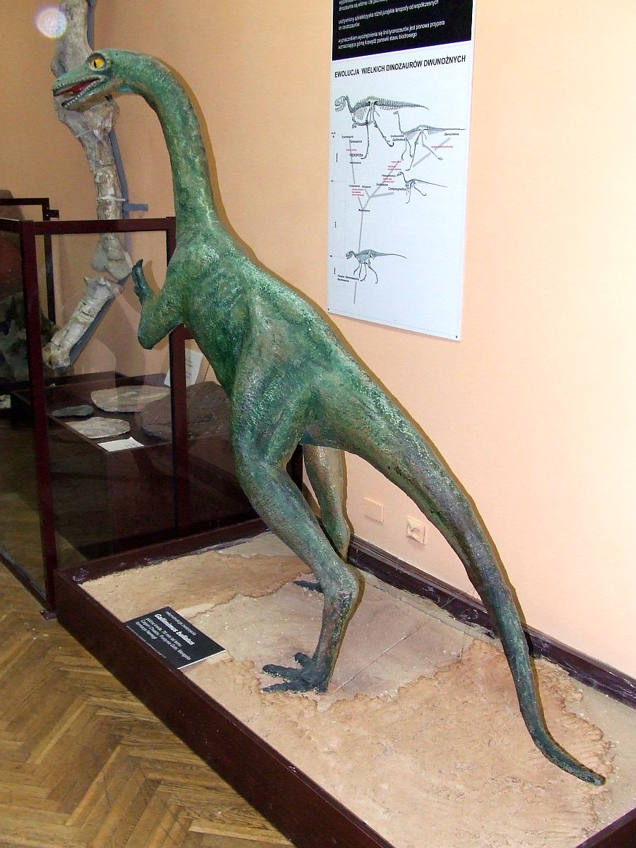 Gallimimus bullatus, model made by Wojciech Skarżyński, scale 1:2, Muzeum Ewolucji PAN